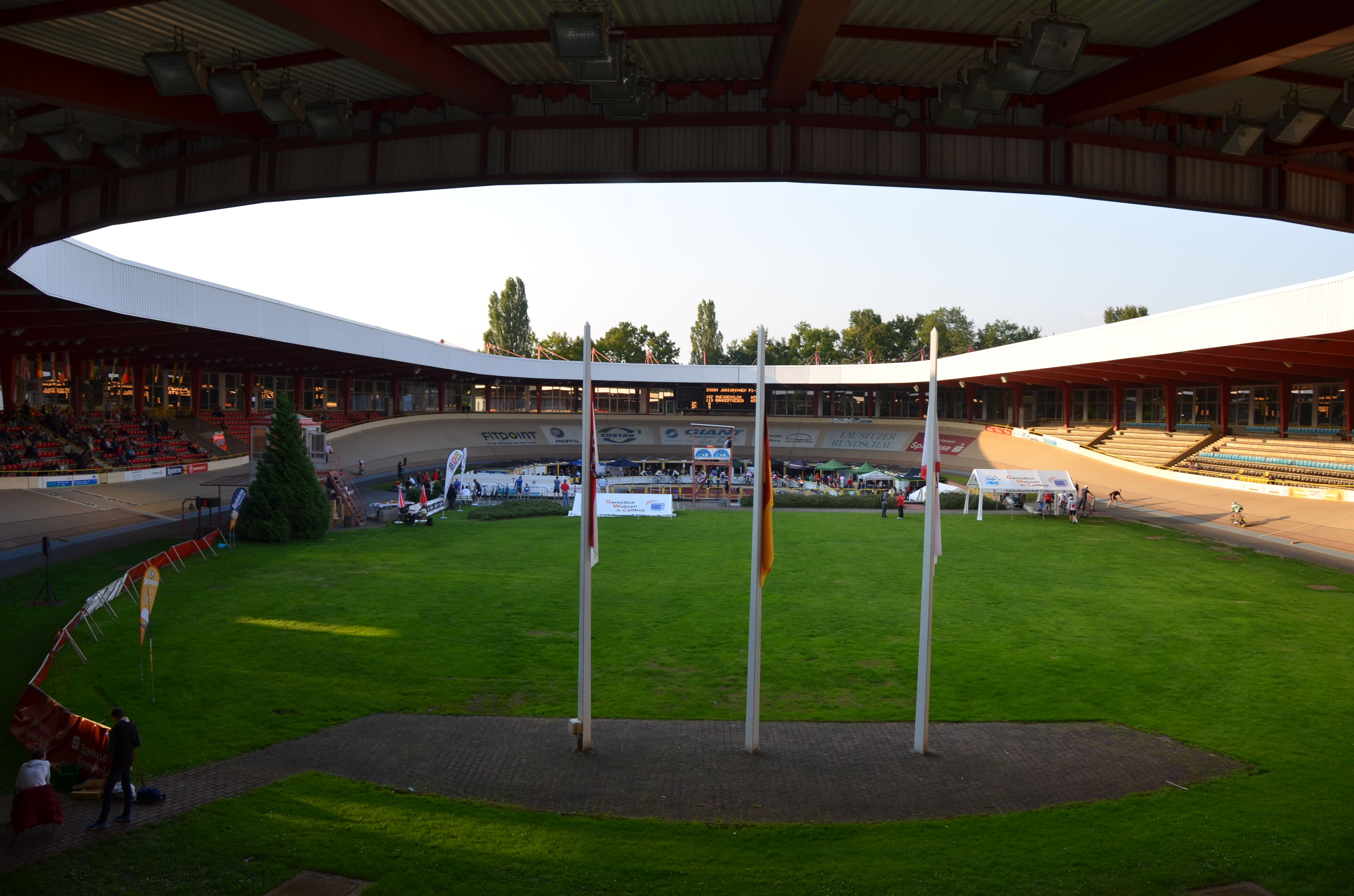 Radstadion Cottbus Bahn-DM 2014 The making of this document was supported by the Community-Budget of Wikimedia Germany.